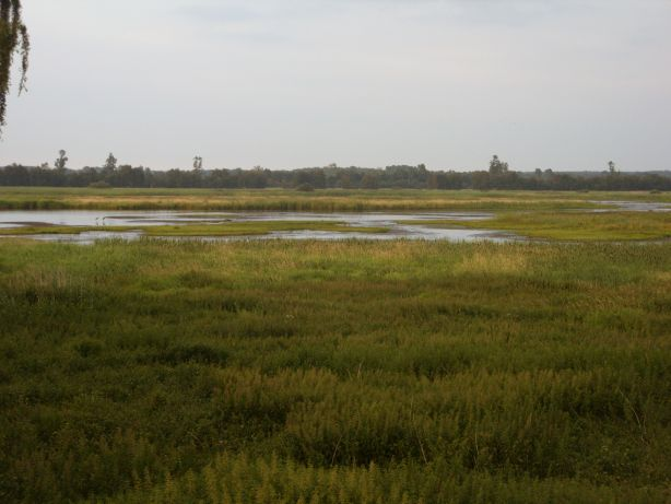 Polder Bramel Blick vom Aussichtsturm